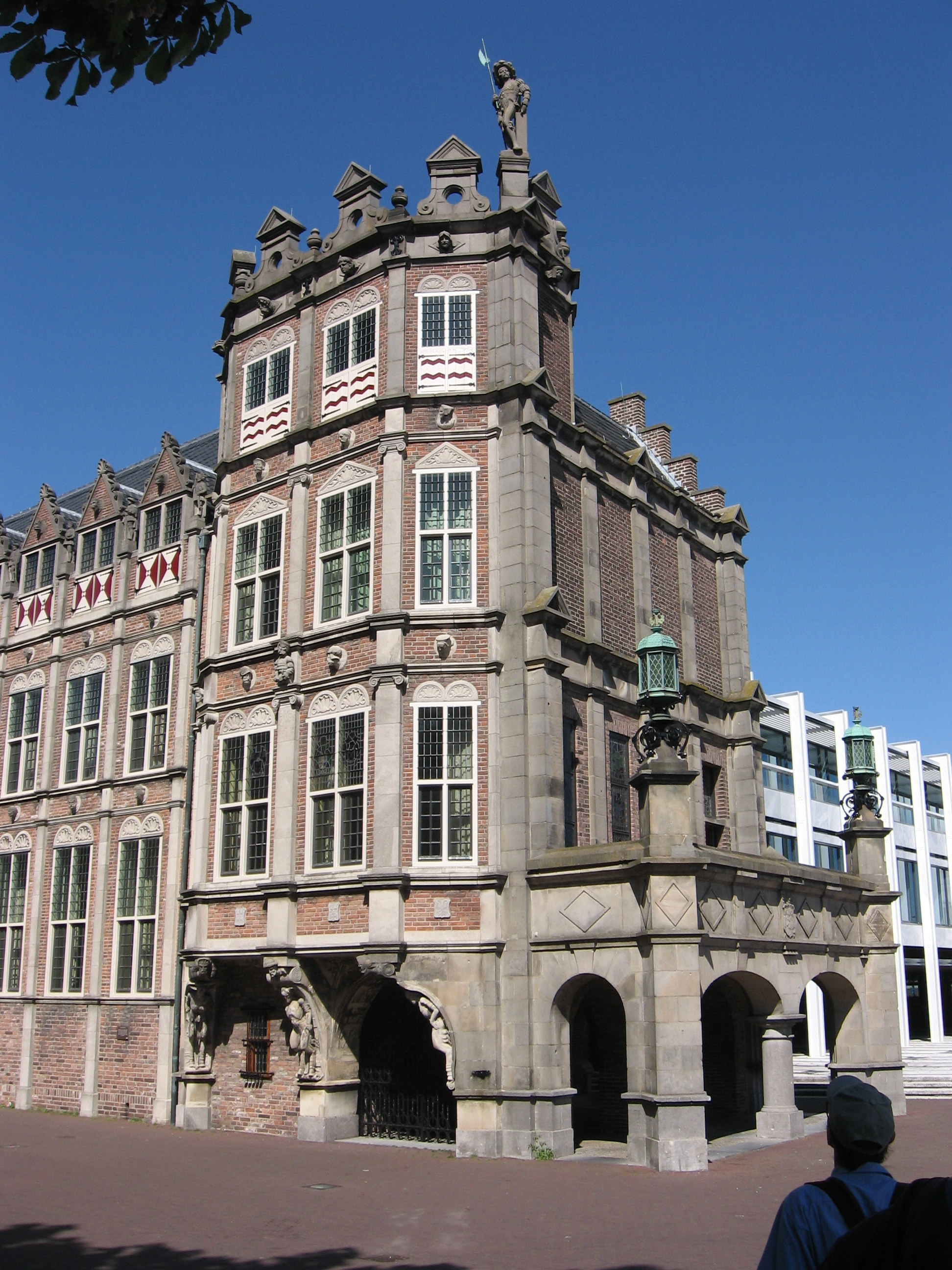 Duvelshuis, Arnhem